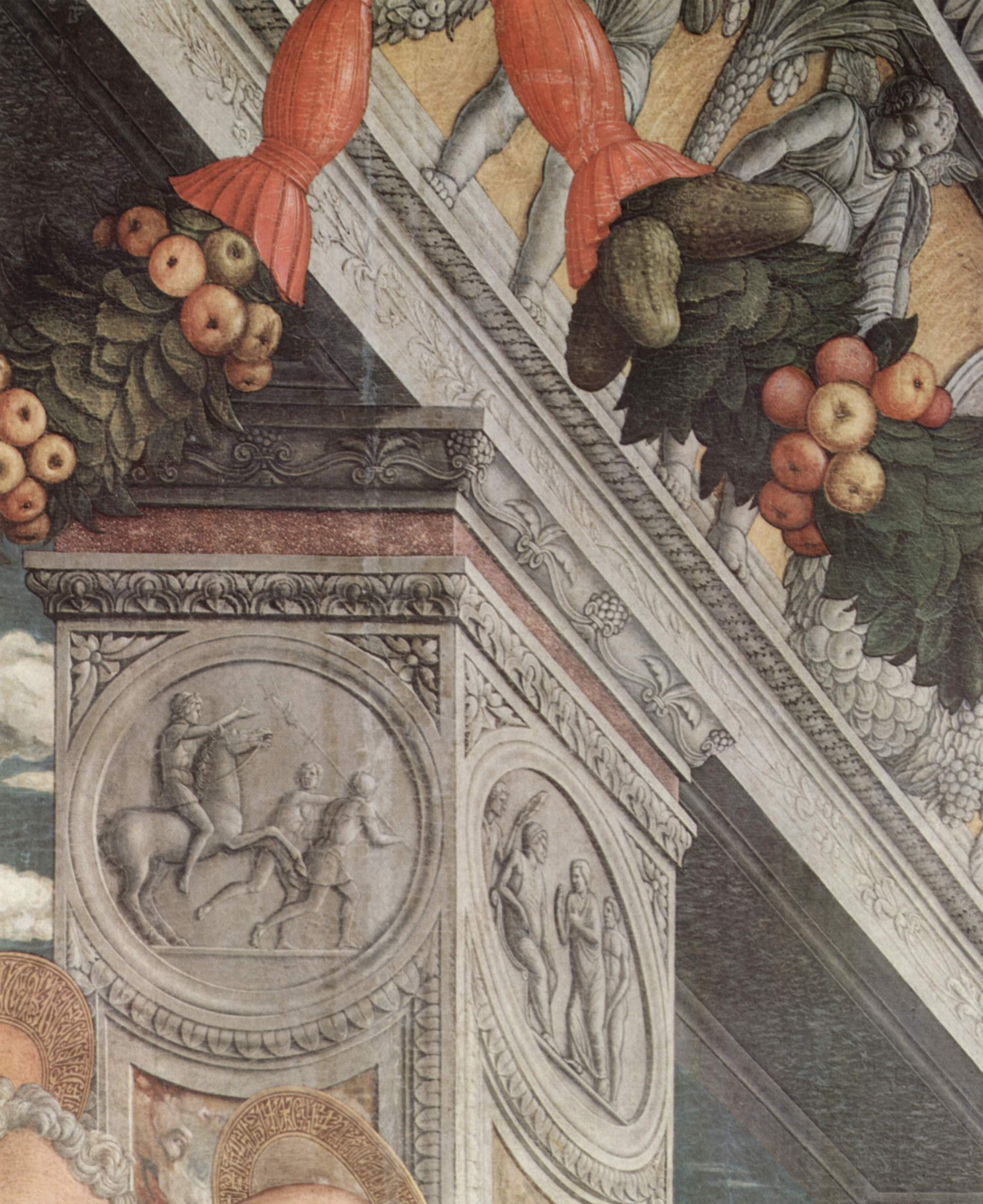 detail: Architektur und GirlandenPredellatafeln in Paris und Tours